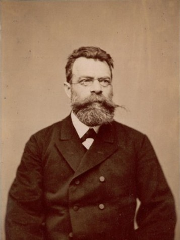 Martin Kolář (1836 - 1898), Český historik a heraldik.